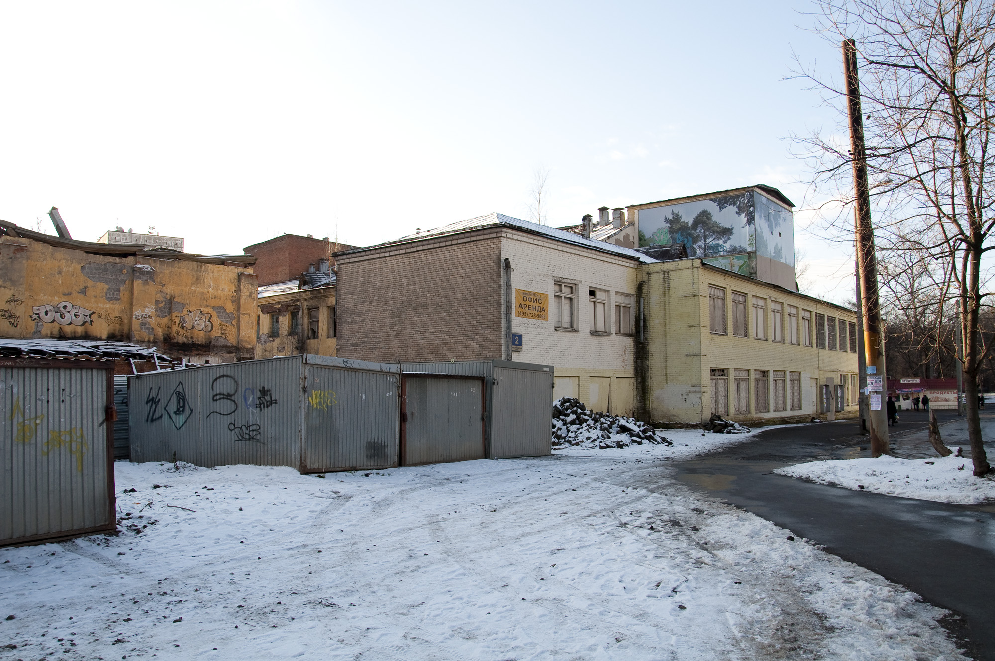 Богородские бани в современном состоянии - Декабрь 2011. Бани находились на безымянной трамвайной площади, на углу Кузнецовский и 1-й Мясниковской улиц. Снесены в декабре 2012 - на их месте "Соколиный форт"